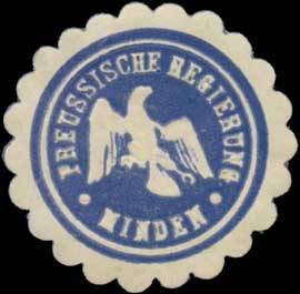 Sealing stamp Title: Pr. Regierung Minden Description: blau, weiß, geprägt Place: size: 3 cm